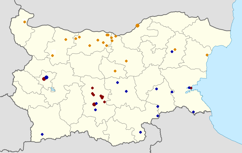 Католически енории в България